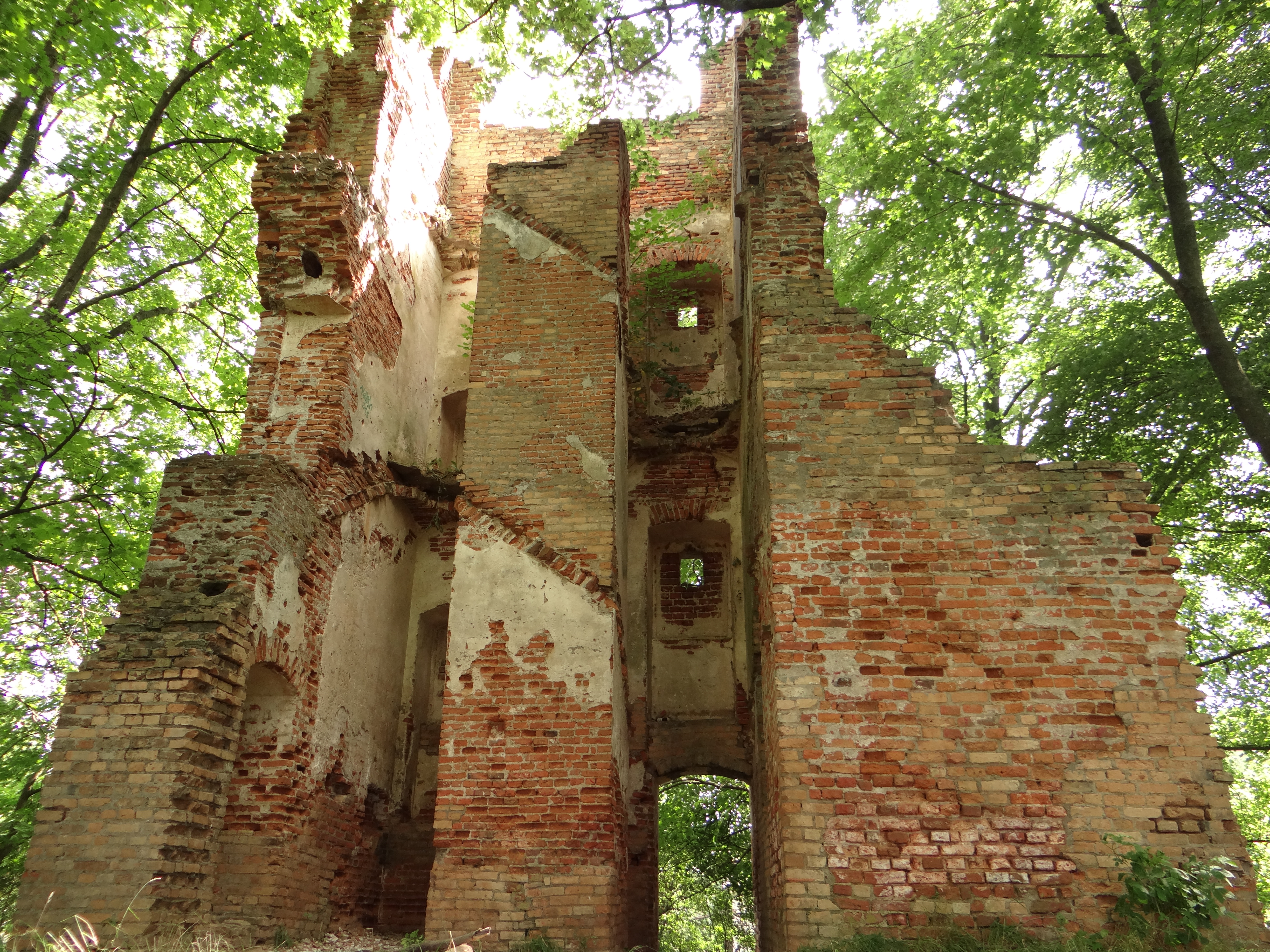 Ruiny- widok od strony pól